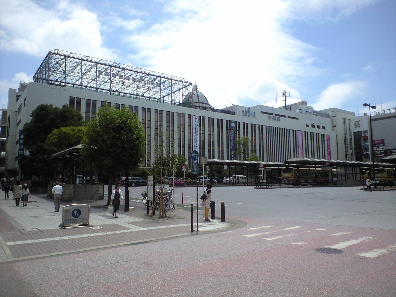 Hiratsuka Station (north exit) on Tokaido Main Line, Hiratsuka, Kanagawa, Japan 平塚駅